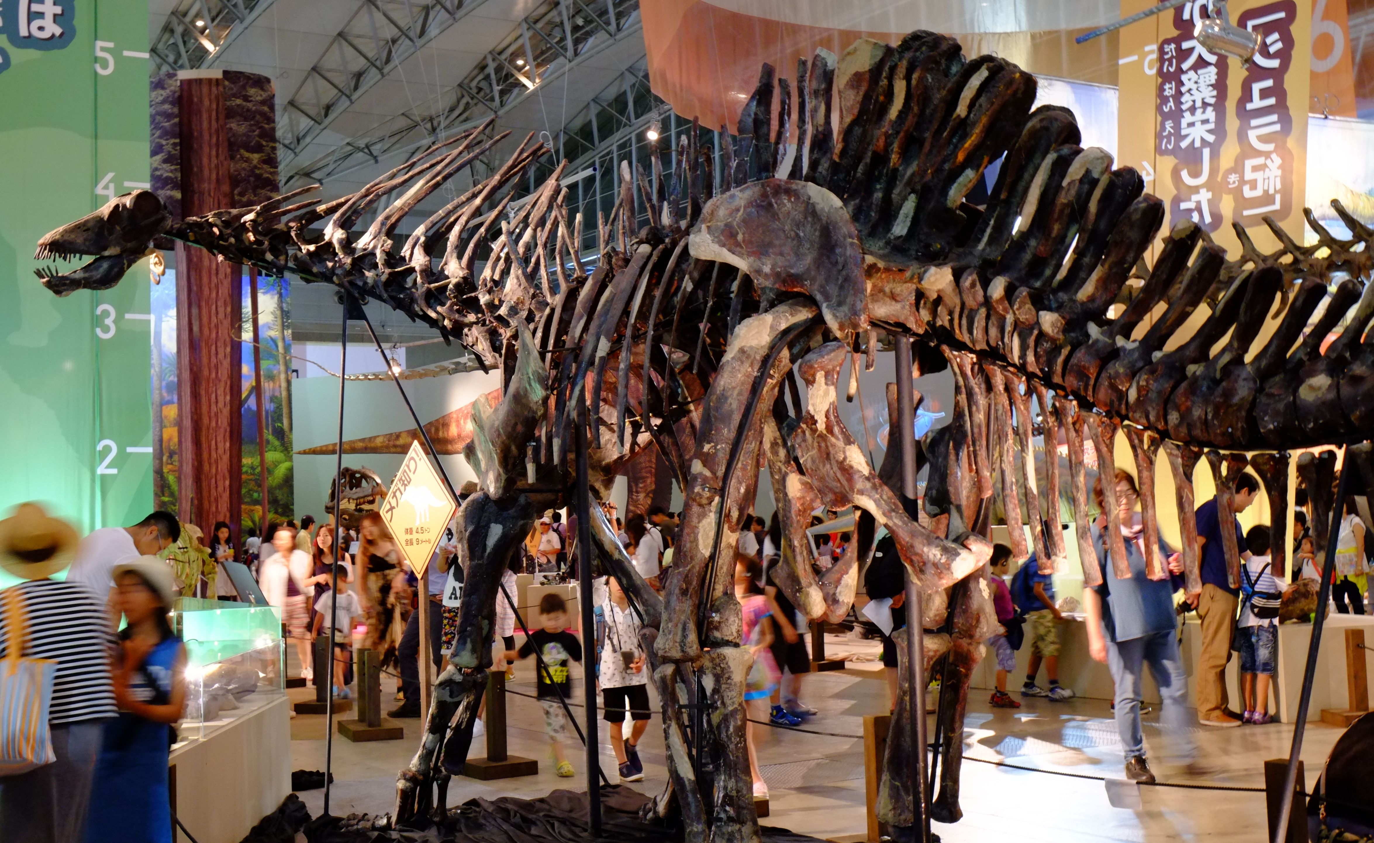 スピノサウルスも良いけどアマルガサウルスも好き。